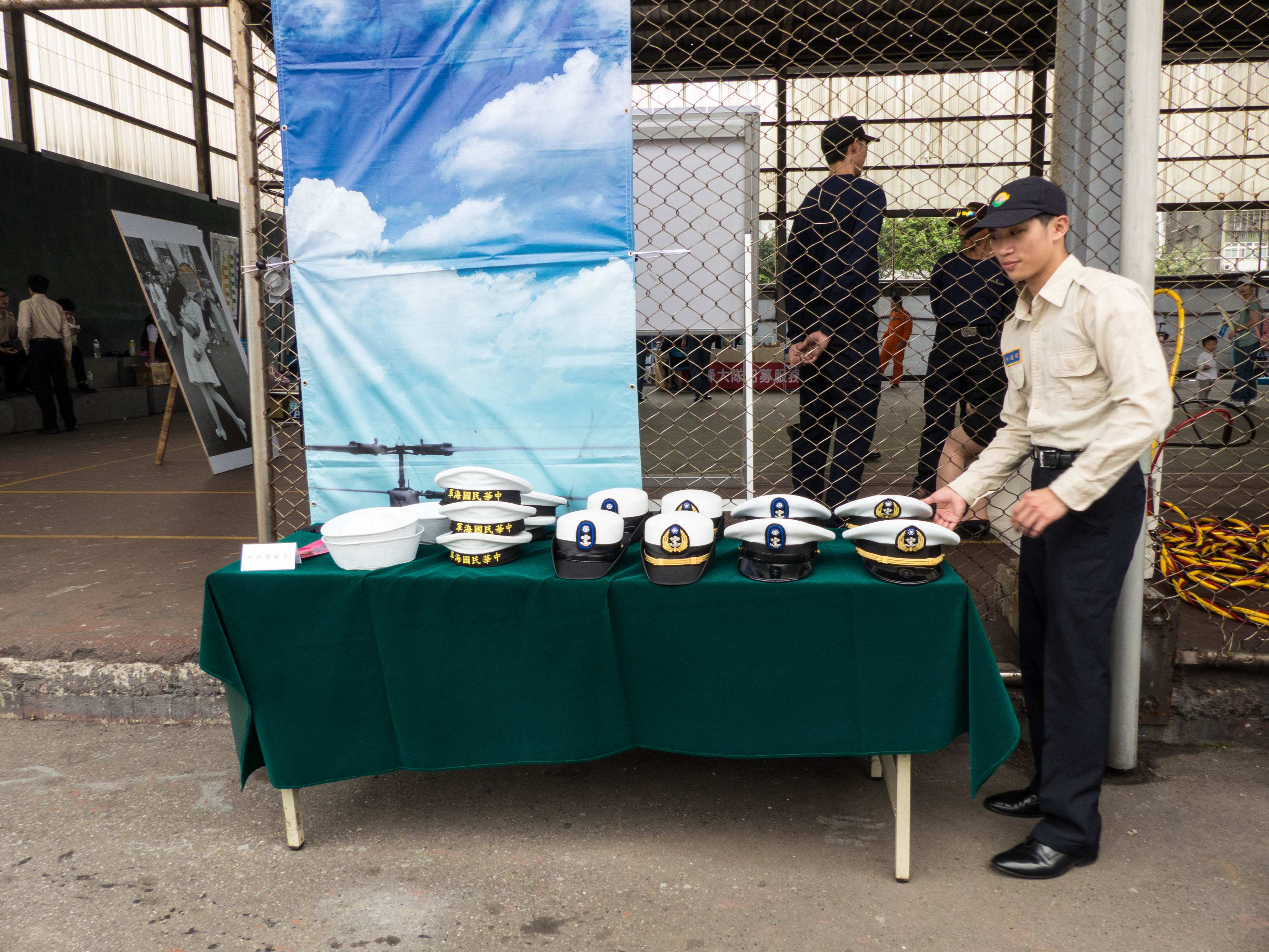 中華民國海軍103年敦睦遠航訓練支隊基隆訪問，人才募集區入口前桌上擺設的中華民國海軍水兵、士官、軍官各式制帽，供遊客試戴。左起：白色無簷水兵帽（中士以下配戴，男女通用）、白色無簷大盤帽（中士以下配戴，男女通用）、士官白色黑簷帽（女性上士、士官長配戴）無帽飾、軍官白色黑簷帽（女性軍官配戴）無帽飾、士官白色大盤帽（男性上士、士官長配戴）無帽飾、軍官白色大盤帽（男性軍官配戴）無帽飾。